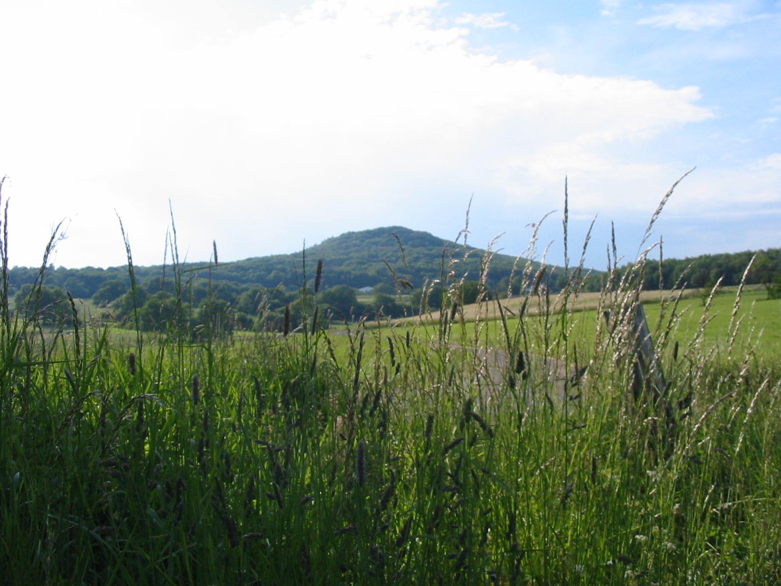 Der Weiselberg von der Haupersweiler Seite aus photographiert